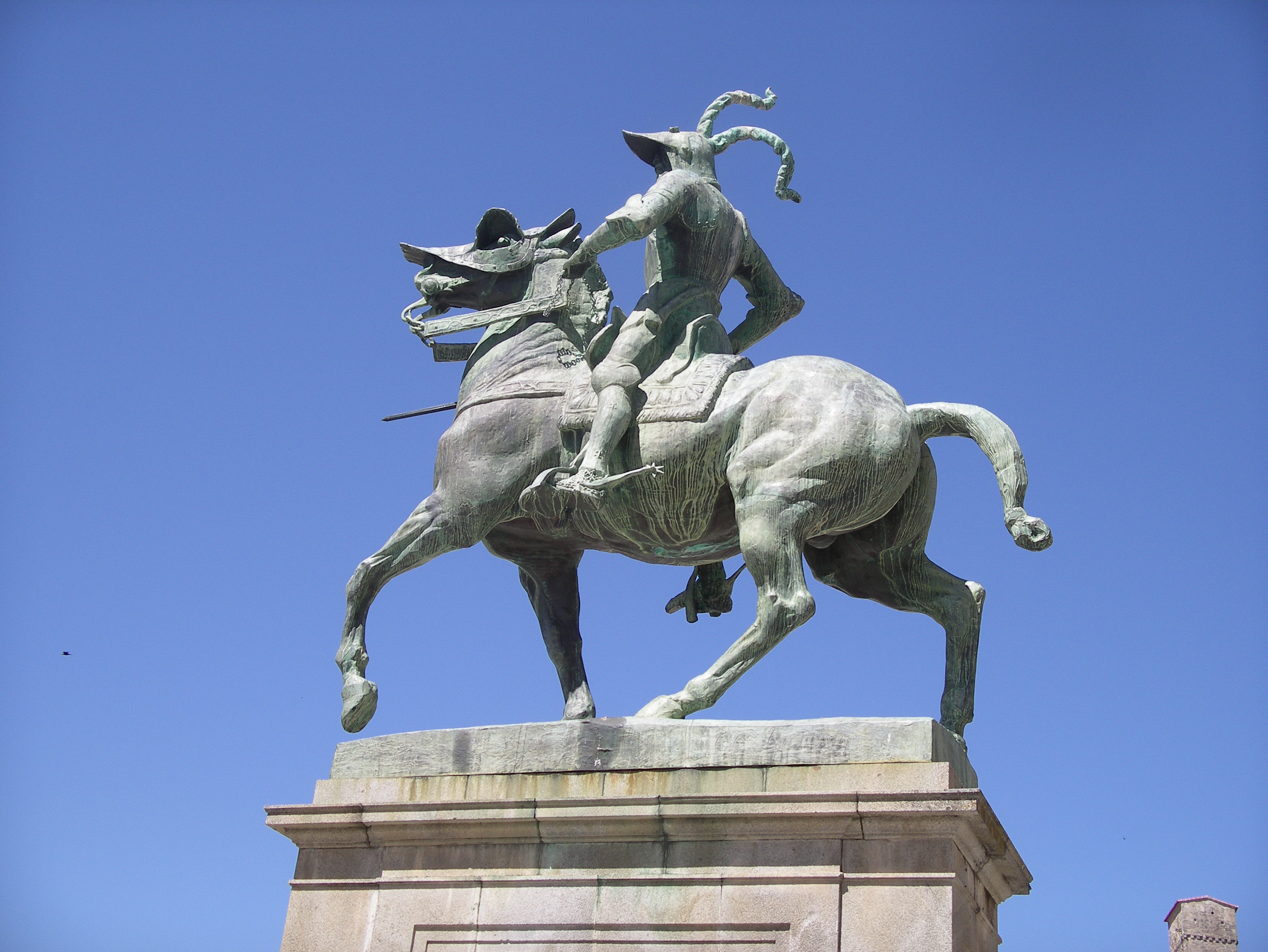 Monumento a Pizarro. Plaza de Trujillo